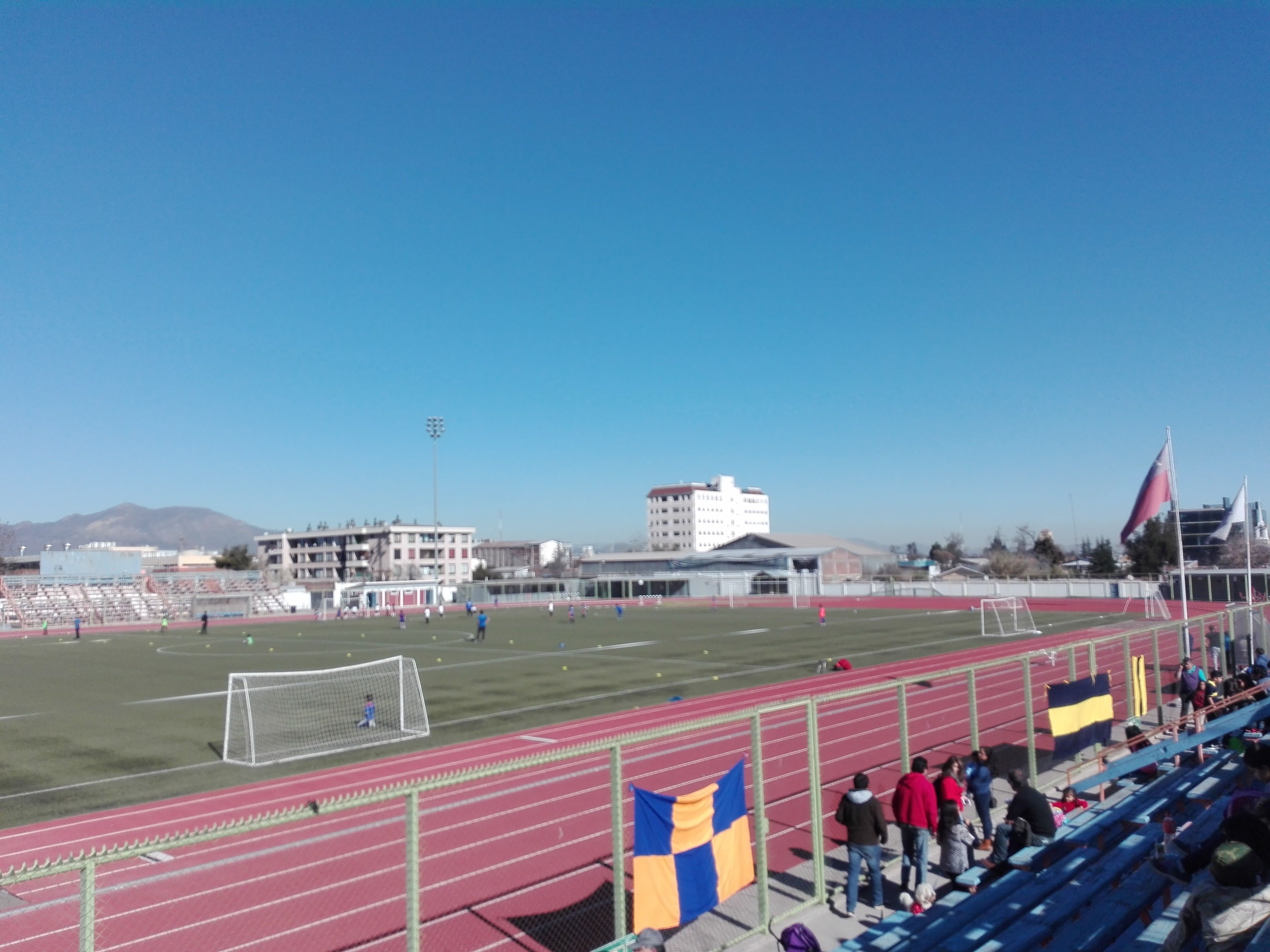 Cancha del Estadio municipal de Puente Alto